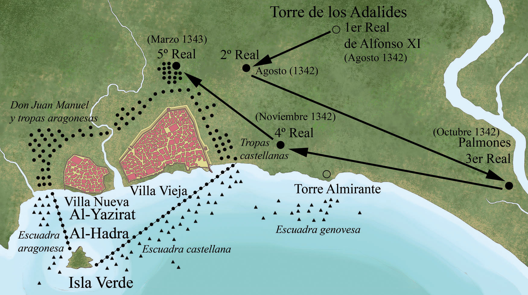 Ilustración de la situación de las tropas sitiadoras castellanas durante al asedio a Algeciras en 1344.